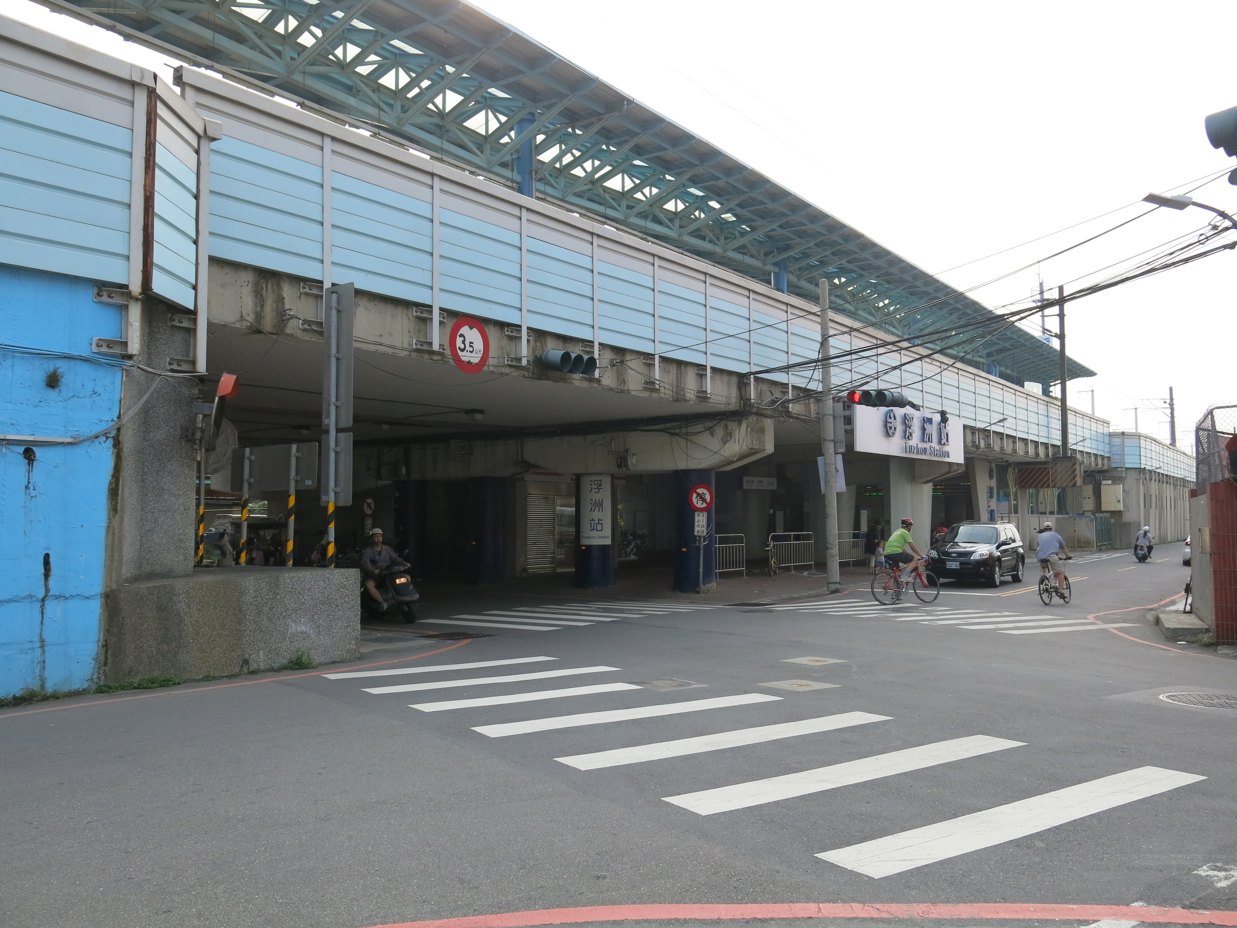 中文（台灣）: 台鐵浮洲站於2015年11月